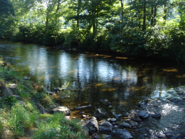 Cère, parc Vic-sur-Cère a2